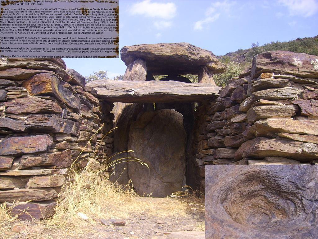 Rabós d'Empordà 42º 26' 10"N 3º 3' 6"E